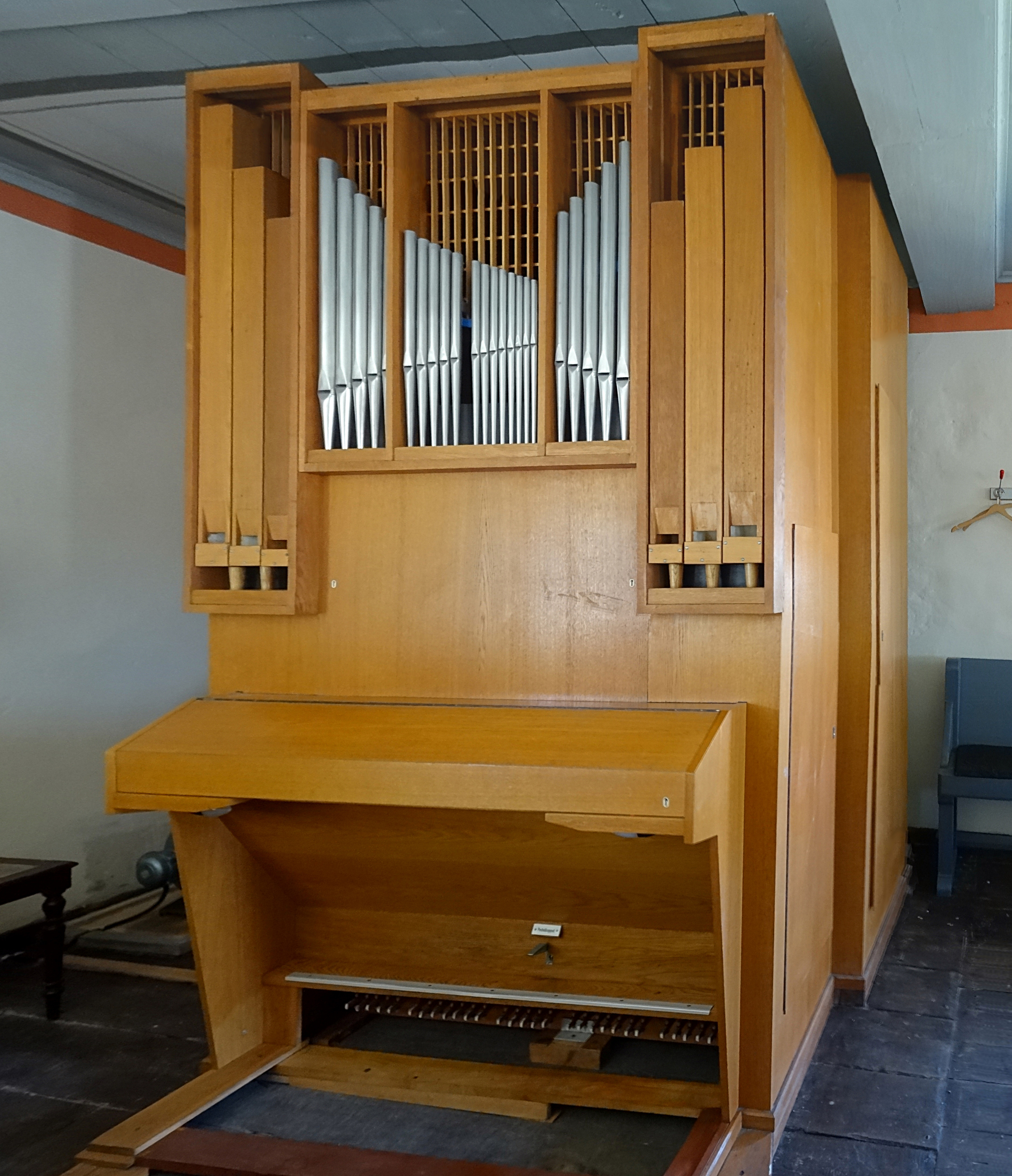 Orgel von Schönefeld Orgelbau (1977, IP/5) in der Heilig-Kreuz-Kirche Stadtroda